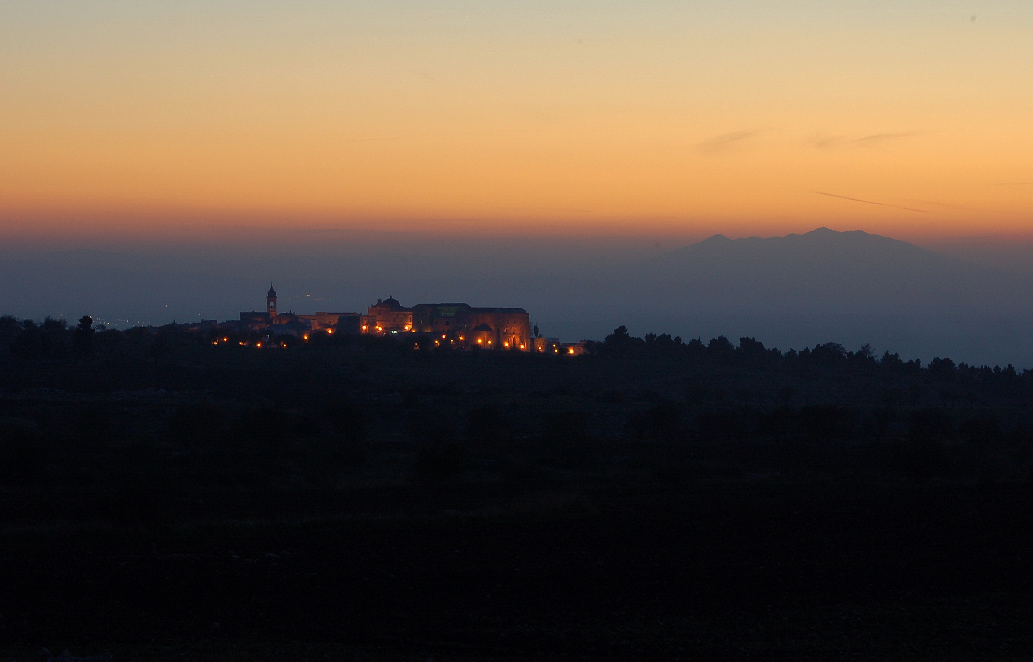 Minervino Murge, Puglia, Italia